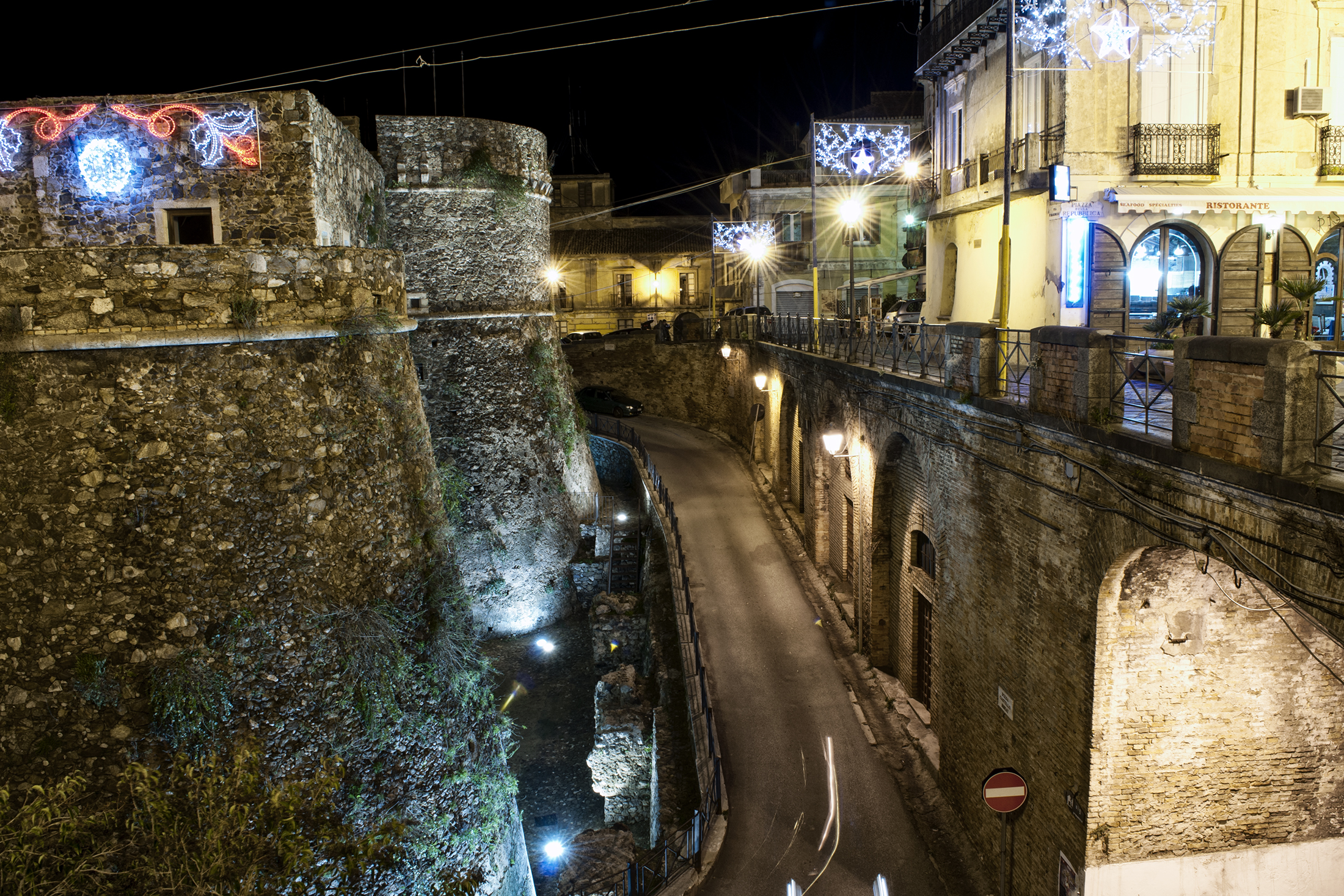 Castello Murat This is a photo of a monument which is part of cultural heritage of Italy.